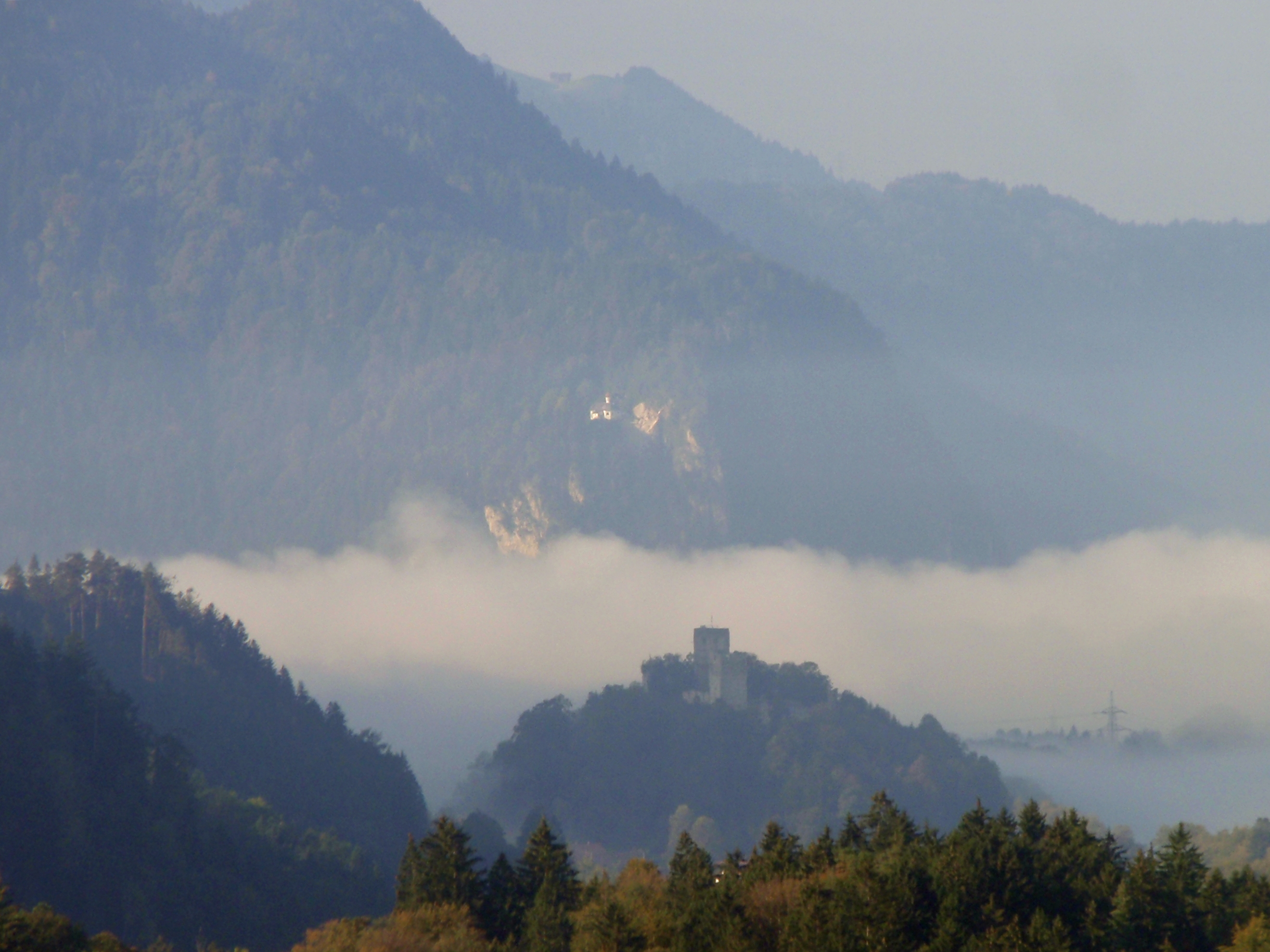 Burg Kropfsberg (Gde. Reith im Alpbachtal) vom Mariahilfbergl in Brixlegg aus gesehen